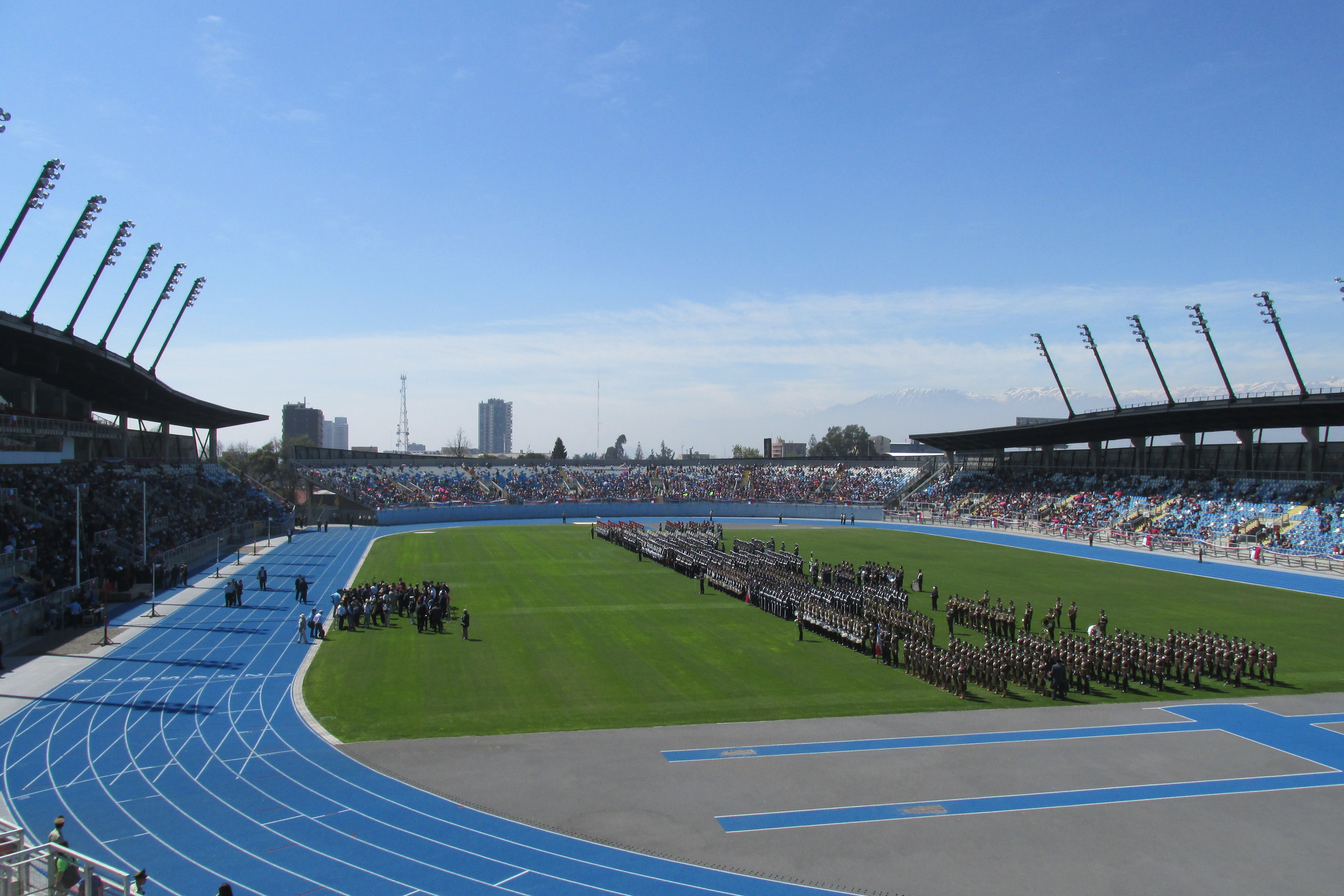 Desfile Cívico Militar 2 de Octubre, en Estadio El Teniente, conmemorando Bicentenario Batalla Rancagua